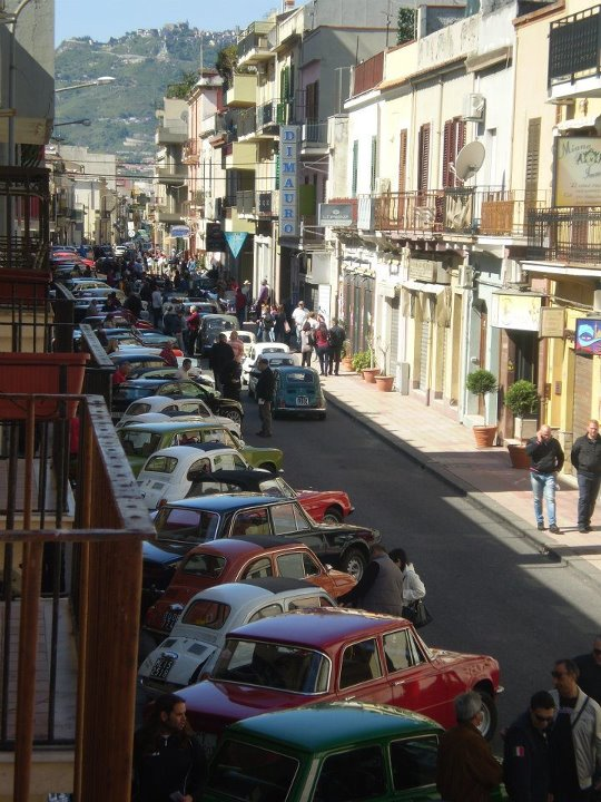 Corso principale di Santa Teresa di Riva